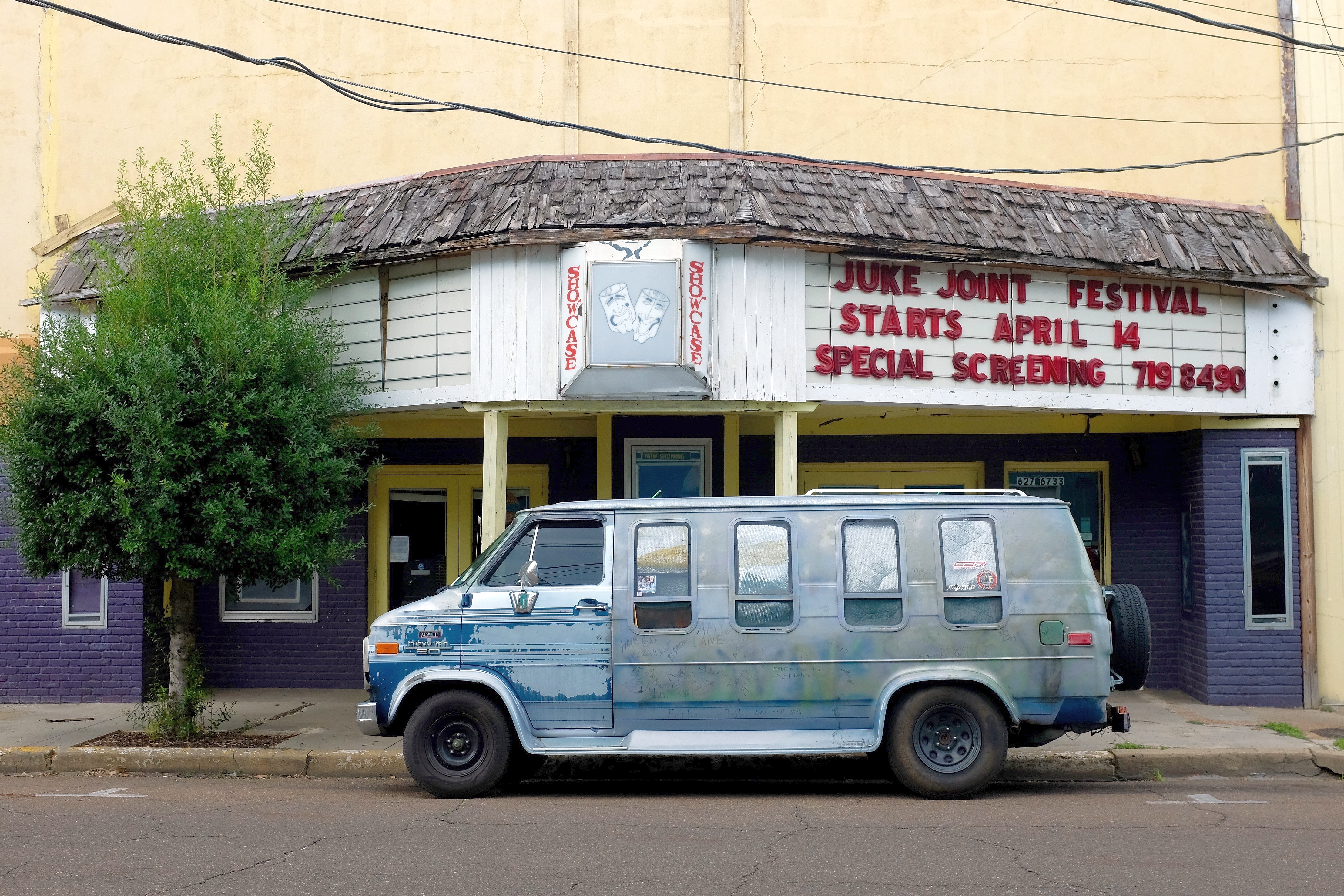 Juke Joint Festival at Delta Cinema in Clarksdale, Mississippi.